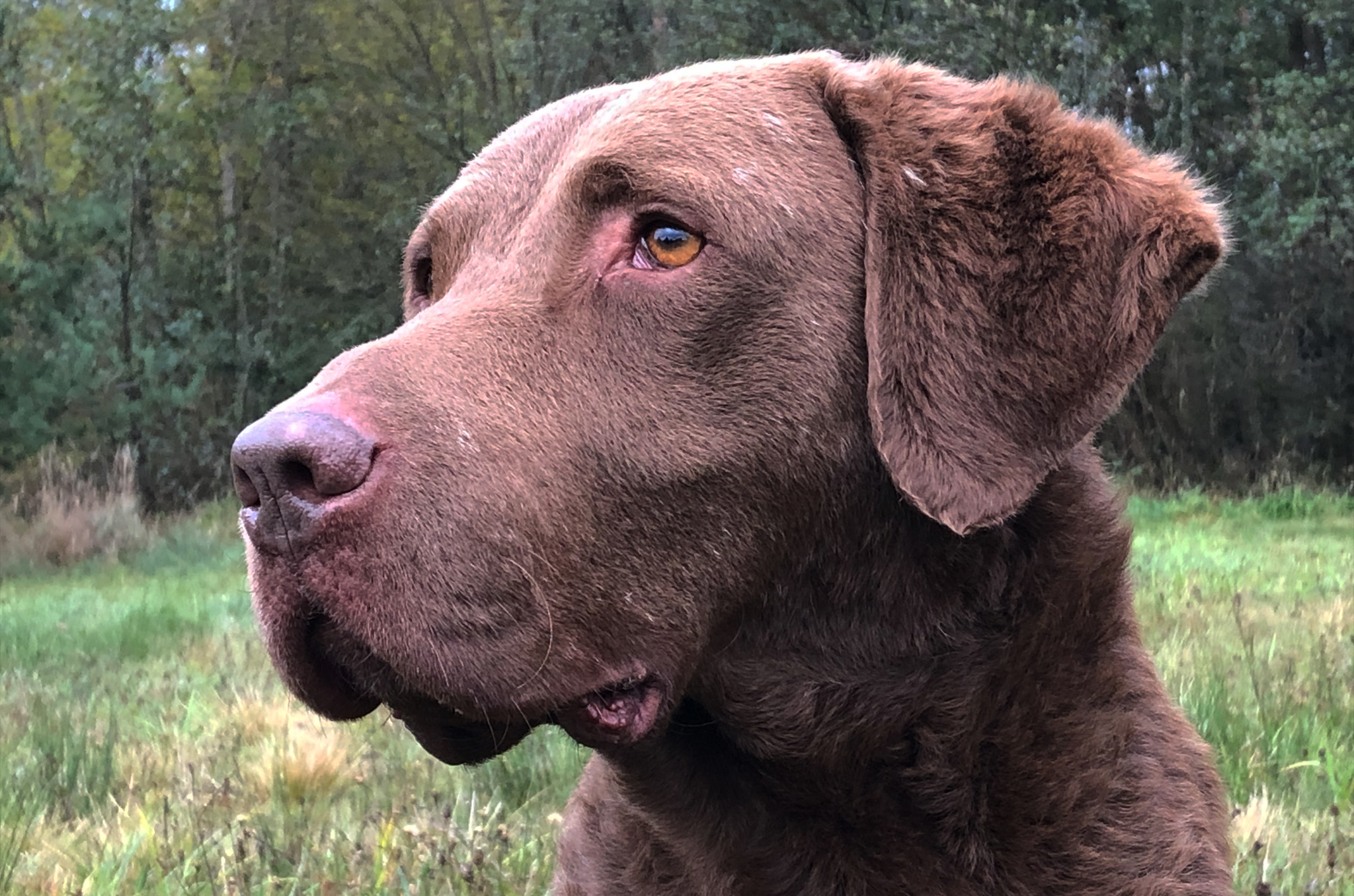 Chesapeake Bay Retriever - hlava